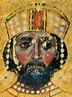 Buchmalerei, Werkstatt Byzanz, wahrscheinlich vom Hofkünstler des Kaisers Nikephoros Botaneiates (1078-1081)